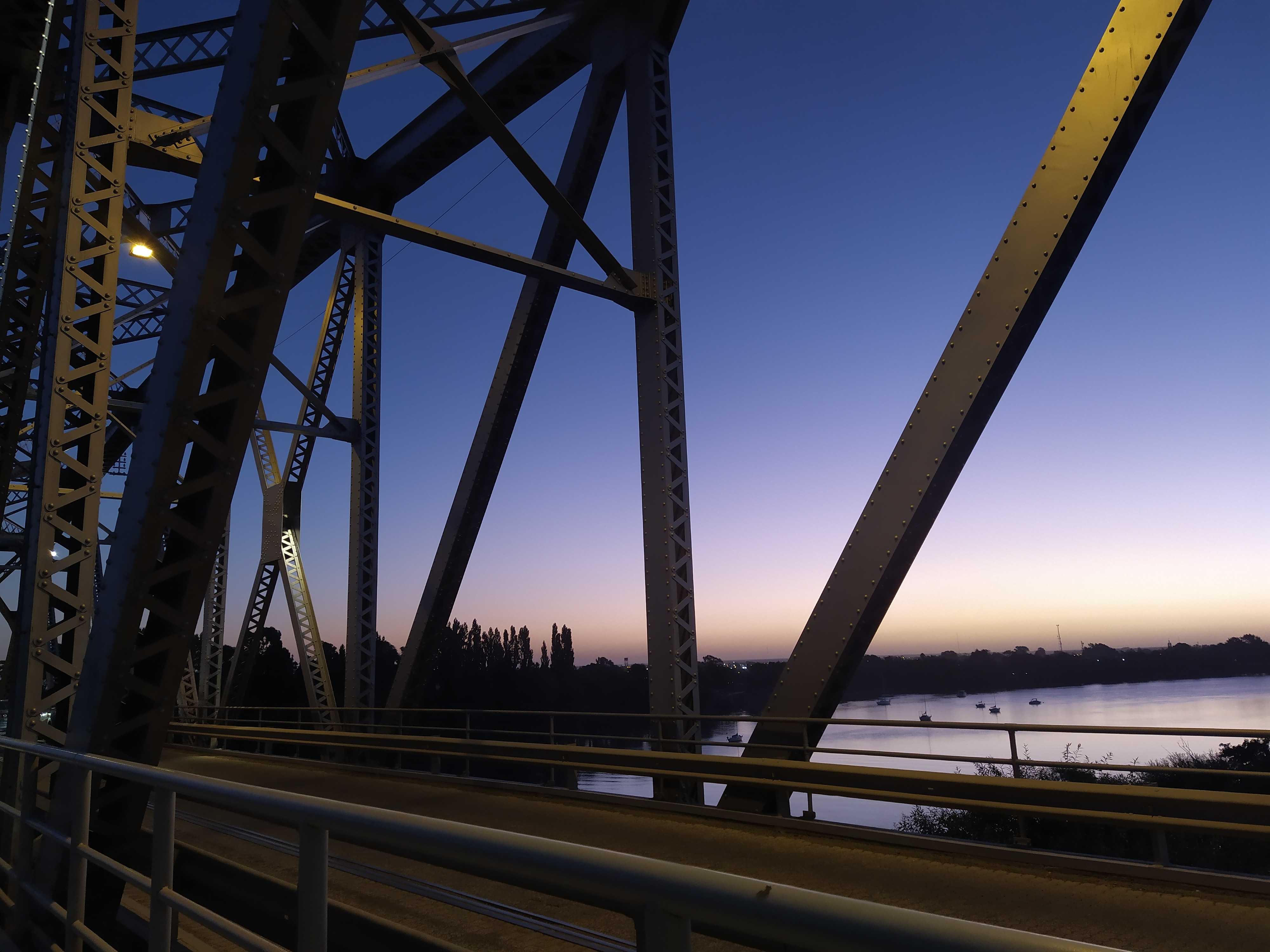 Puente Carretero de Viedma, Rio Negro.